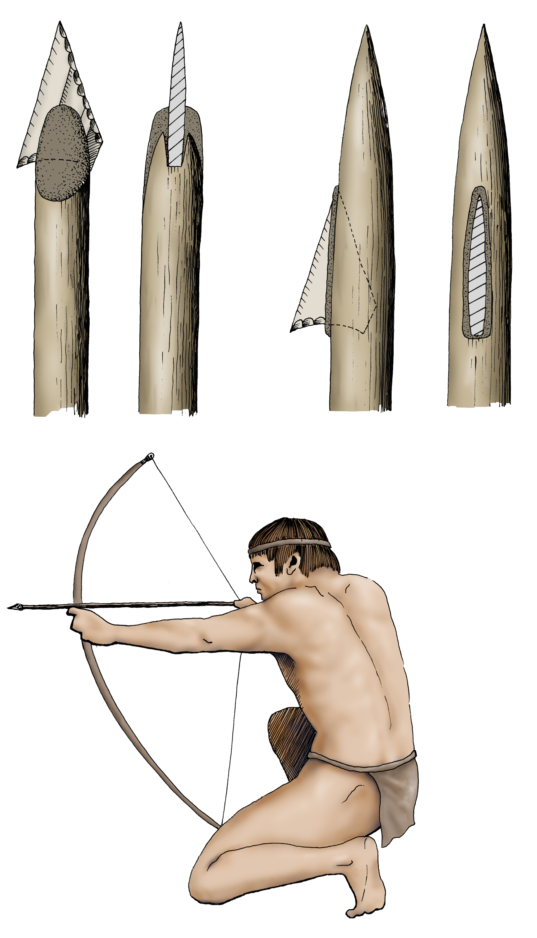 Armes de l'època prehistòrica (F. Chiner).